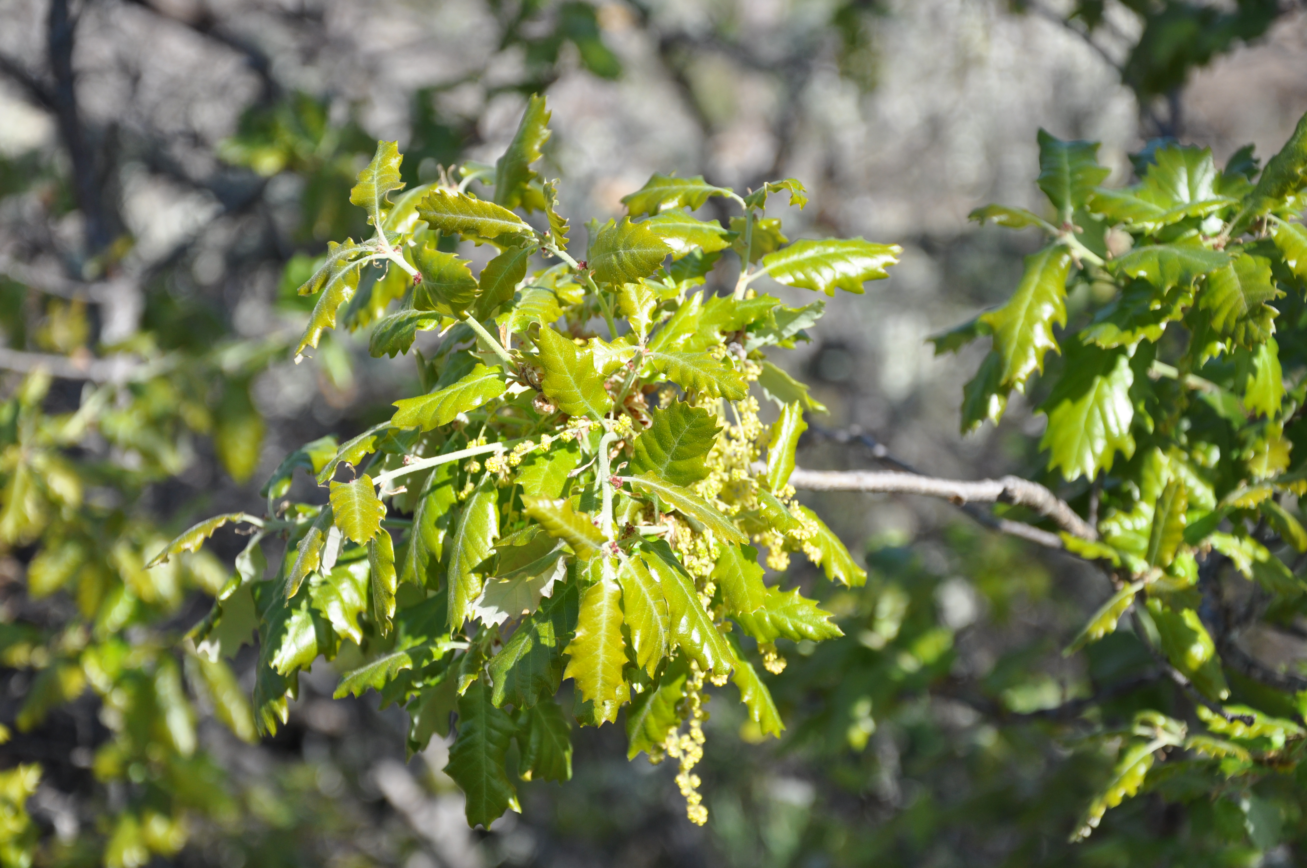 Folhas novas de cerquinho (Quercus faginea). Miranda do Douro, Portugal.